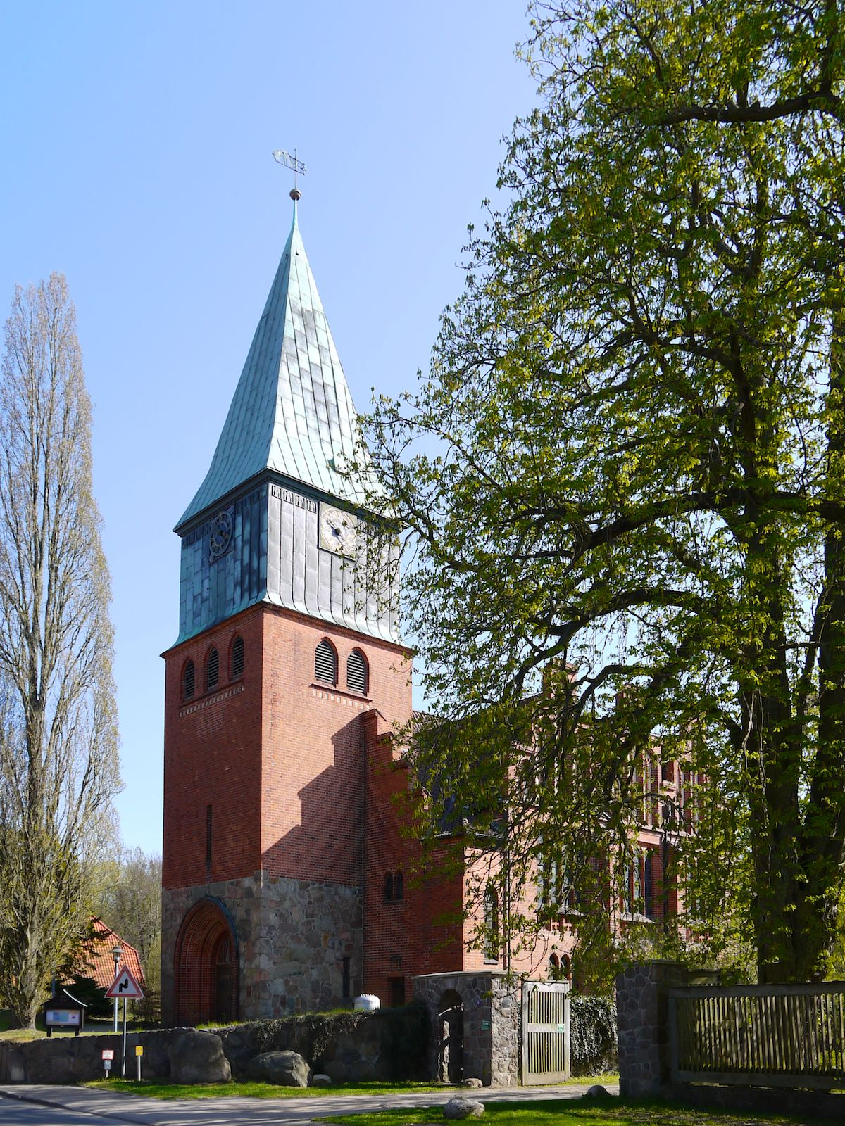 St. MIchaelis-Kirche von Schnega